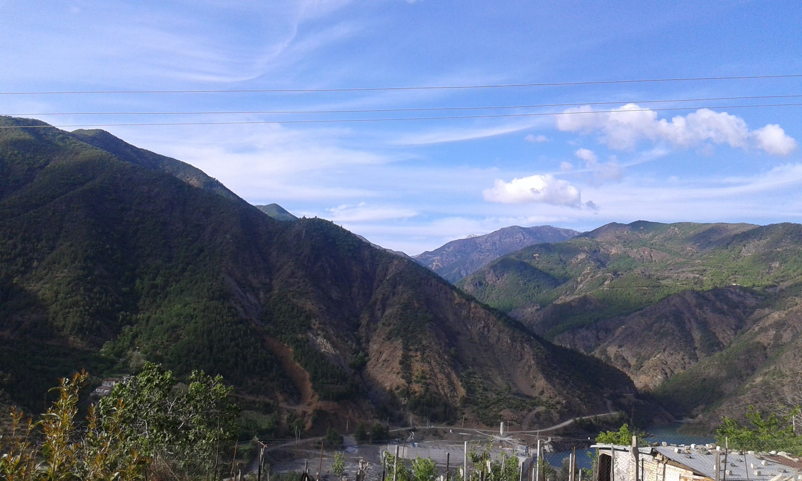 Bjeshka e Oroshit, Mirdite